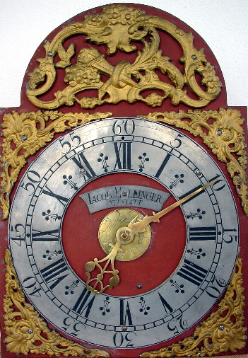 Zifferblatt